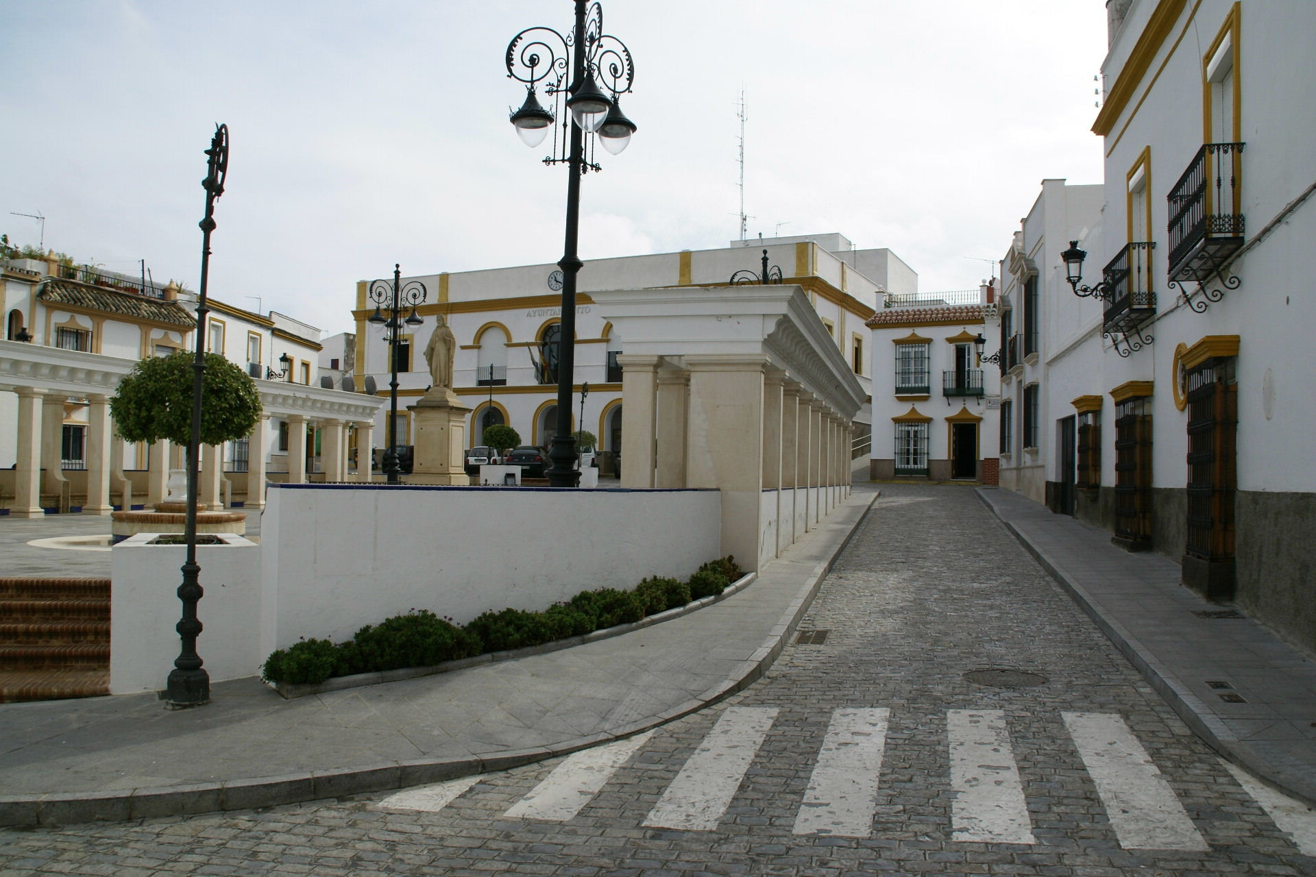 Plaza de la Constitución, Las Cabezas de San Juan (Andalusia), Spain